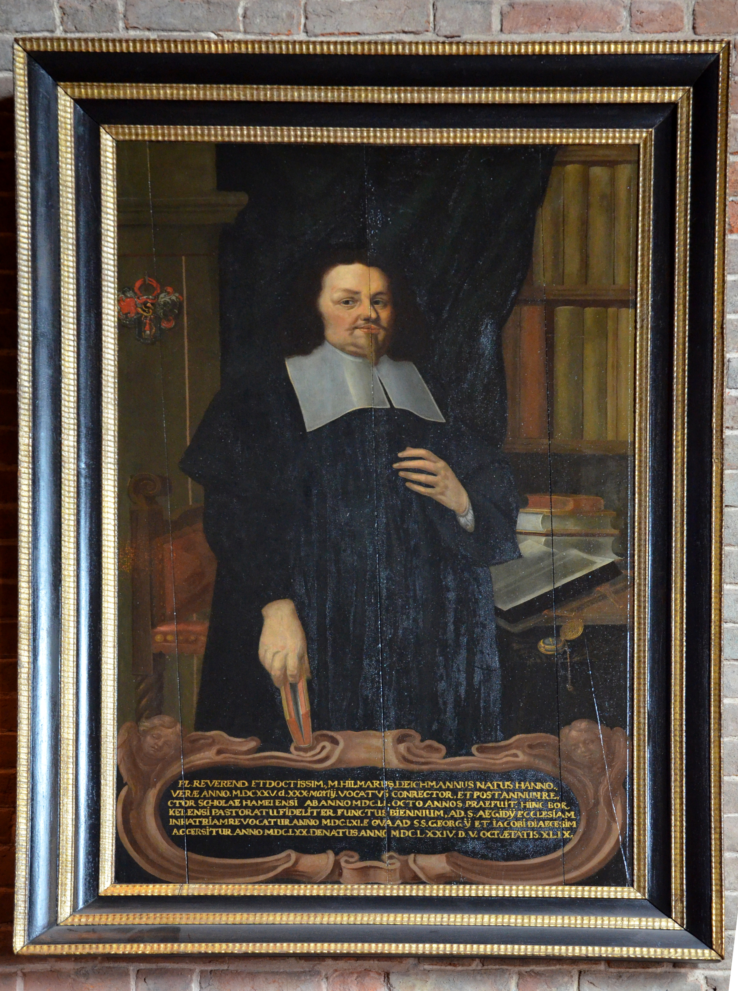 Ganzkörper-Porträt eines noch unidentifizierten Meisters aus dem 17. Jahrhundert mit dem Bildnis des evangelischen Theologen Hilmar Deichmann, 1625 als Sohn eines Drechslers in Hannover geboren. Nach seinem Studium war Deichmann acht Jahre lang oberster Lehrer an der Stadtschule (heute: Schiller-Gymnasium Hameln), arbeitete dann rund 6 Jahre als Pfarrer in Groß Berkel, wurde 1661 Pastor an der Aegidienkirche und 1670 an der Marktkirche St. Jacobi u. Georgii zu Hannover. Die aus vier Brettern zusammengesetzte Eichentafel zeigt - neben dem Wappen der Familie - unten mittig die lateinische Inschrift: „PL. REVEREND. ET DOCTISSIM., m: HILMARUS DEICHMANNUS NATUS HANNO.. / VERE ANNO. M.DCXXV.d. xXX. MARTŸ. VOCATUS CONRECTOR, ET POSTANNUMRE, / CTOR SCHOLAE HAMELENSI AB ANNO MDC.LI. OCTO ANNOS PRAEFUIT. HINC BOR / KELENSI PASTORATUFIDELITER FUNCTUS BIENNIUM, AD.S. AEGIDŸ ECCLESIAM / INHATBIAMBRE VOCATUR ANNO M.DC.LXI. E QUAAD S.S. GEORGŸ ET IACOBI DIAECESIM / ACCERSITUR ANNO M.DC.LXX. DENATUS ANNO MDCLXXIV. D.V.OCTÆTATIS. XLIX.“ Das Gemälde mit dem original zum Tafelbild gehörigen Bilderrahmen ist Eigentum der Evangelisch-lutherischen Landeskirche Hannovers und findet sich nach einer aufwendigen Restaurierung im Jahr 2008 an einer Seitenwand über der Orgel-/Chor-Empore der Marktkirche zu Hannover. Das hier gezeigte Foto wurde aufgrund von Lichtreflektionen ursprünglich von der Seite aufgenommen, mit dem freien und kostenlos herunterladbaren Fotobearbeitungsprogramm GIMP perspektivisch"entzerrt" und anschließend mit dem Bildbearbeitungsprogramm Adobe Photoshop Elements im Kontrast verbessert. Zukünftig sollte von Anfang an ein besser ausgeleuchtetes Foto in höherer Auflösung aufgenommen werden. Eine schriftliche Dokumentation mit Details insbesondere zu den einzelnen Restaurierungs-Verfahren des Gemäldes (sowie mit leicht abweichender Abschrift der lateinischen Texte) hält die Kirchenpädagogin der Marktkirche, Marion Wrede vor ...